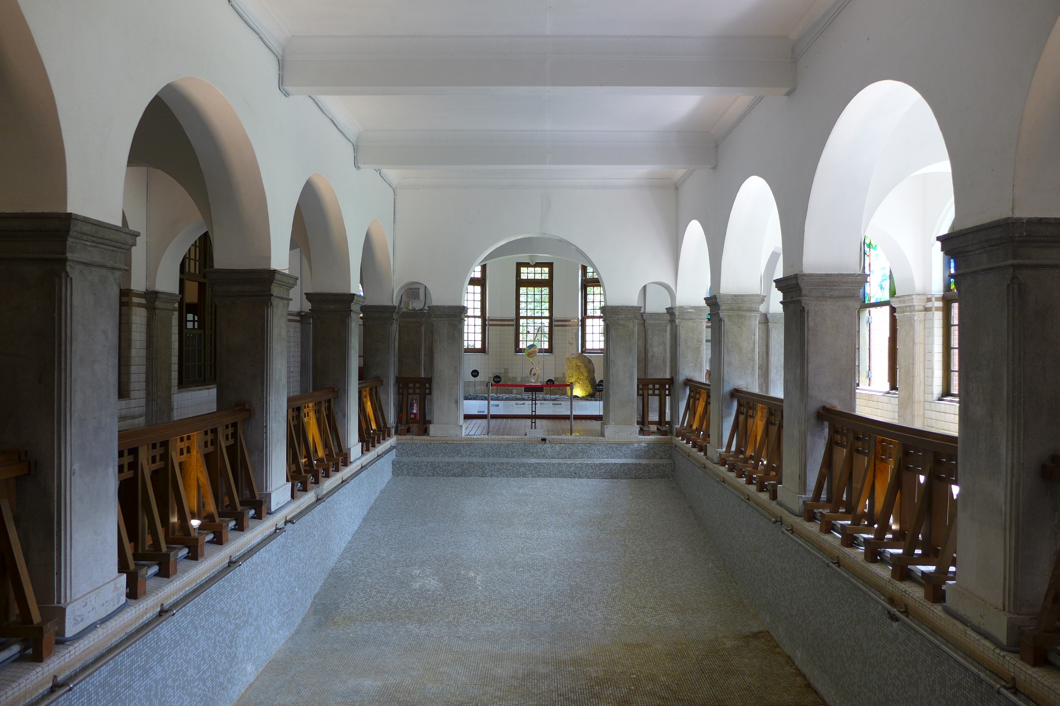 Beitou Hot Spring Museum Tatami Big Bath / Lobby